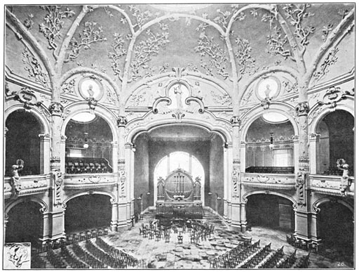 Tentoonstelling Milaan 1906.